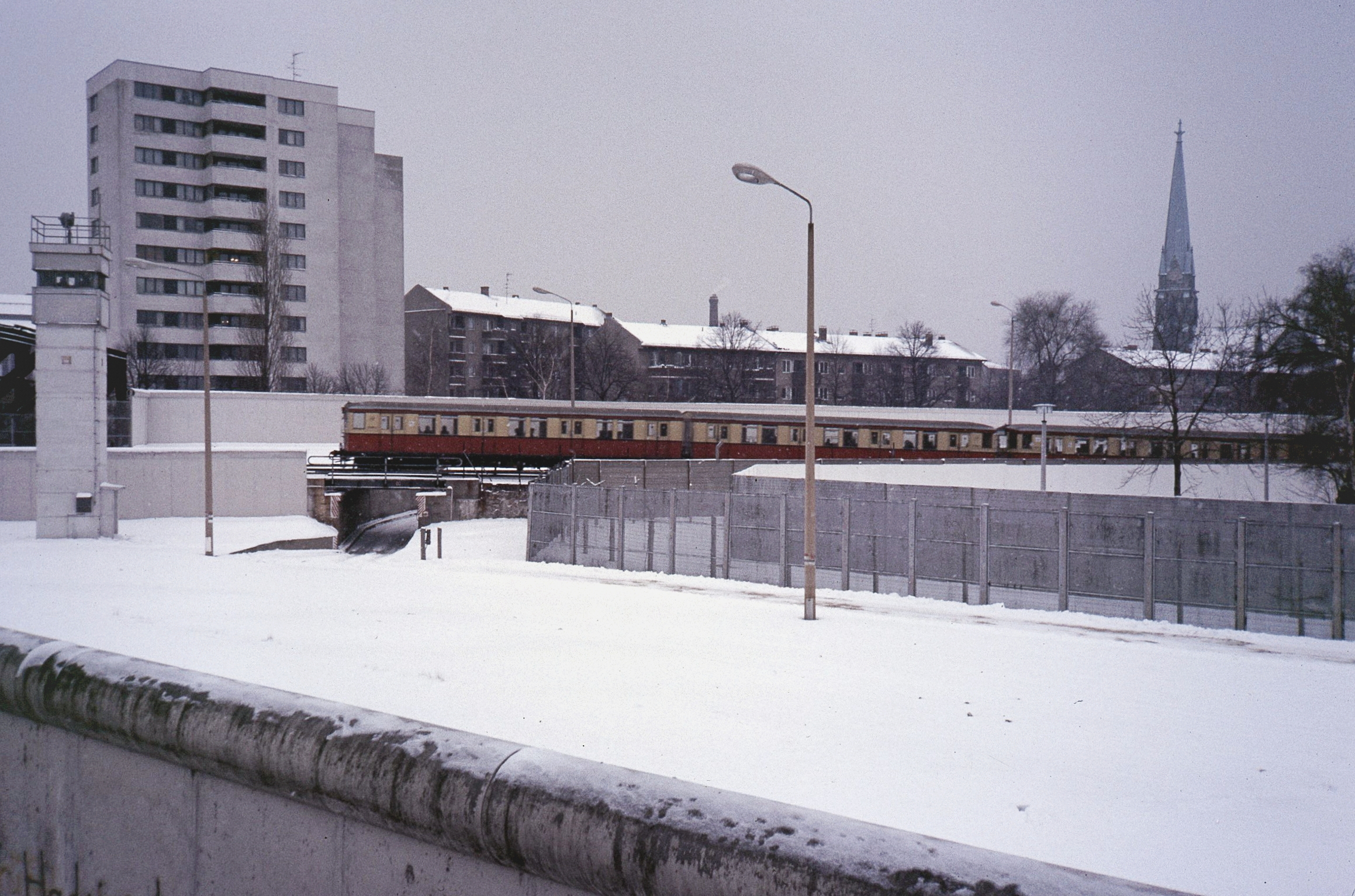 S-Bahn-Zug überquert den Grenzstreifen in Berlin-Wedding